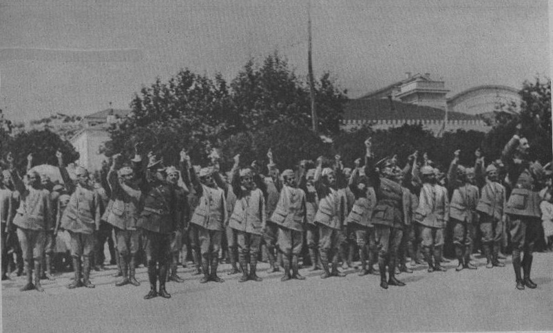 Vénizelistes, Troupes grecques prétant sermant pour former l'armée greque au côté des Alliés.